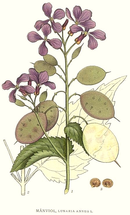 Original Description Månviol, Lunaria annua L.